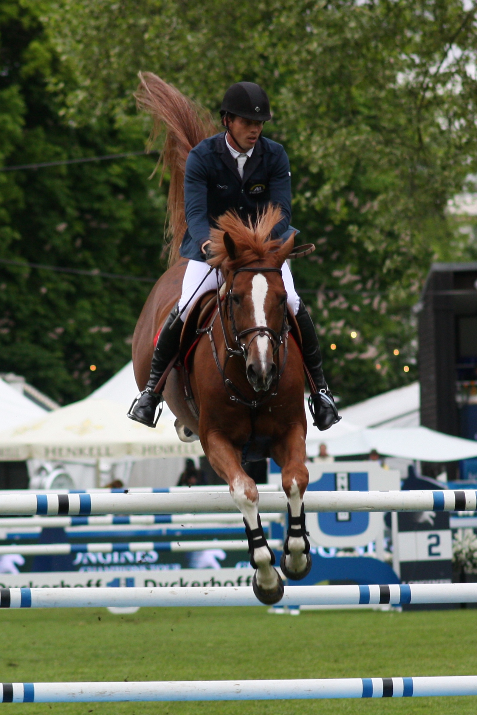 77. Internationanles Wiesbadener Pfingstunier 2013, CSI***** Eröffnungsspringen, Harrie Smolders auf Emerald Personality rights warningAlthough this work is freely licensed or in the public domain, the person(s) shown may have rights that legally restrict certain re-uses unless those depicted consent to such uses. In these cases, a model release or other evidence of consent could protect you from infringement claims.